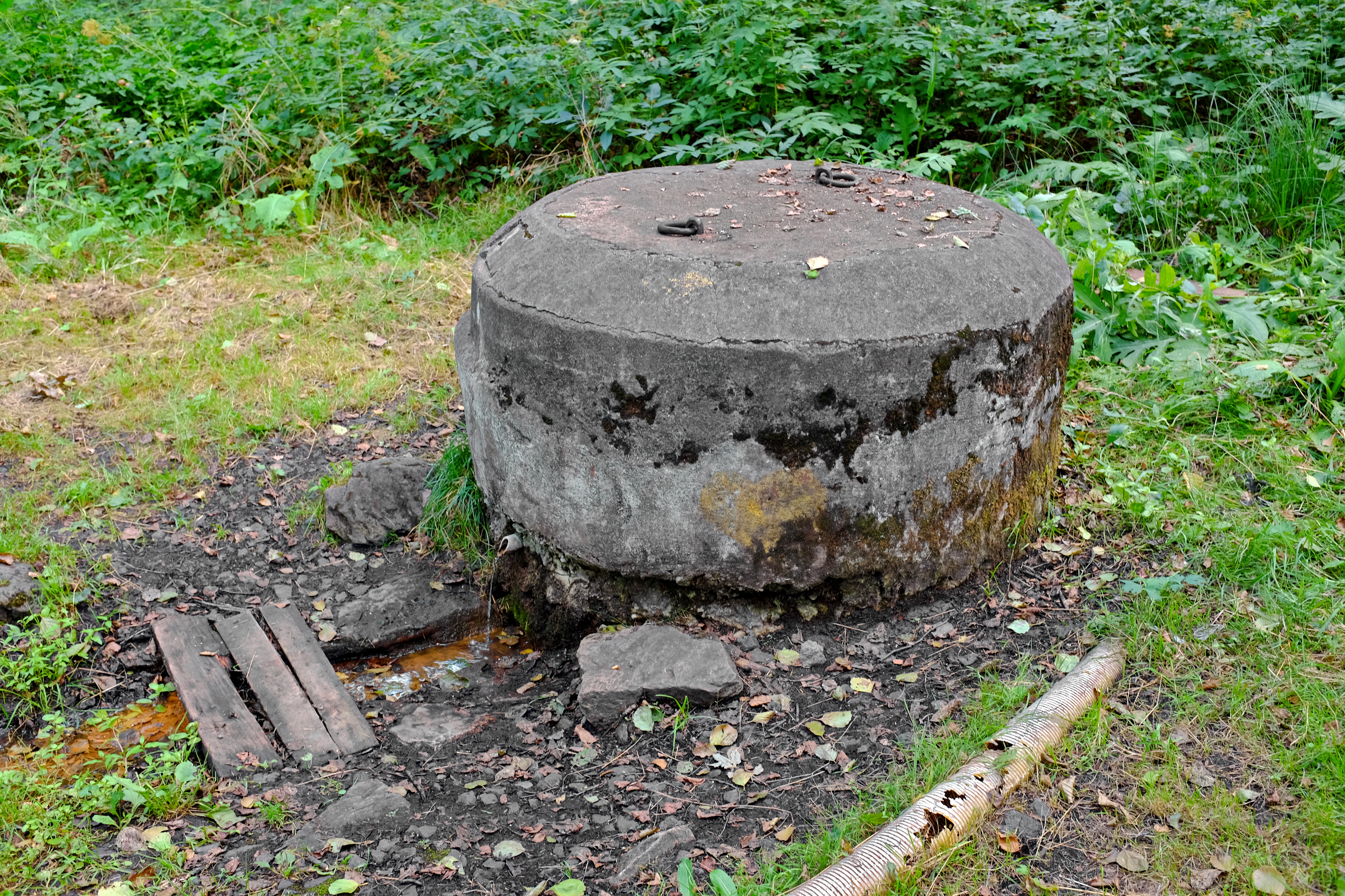 Šabina, Šabinská kyselka, okres Sokolov